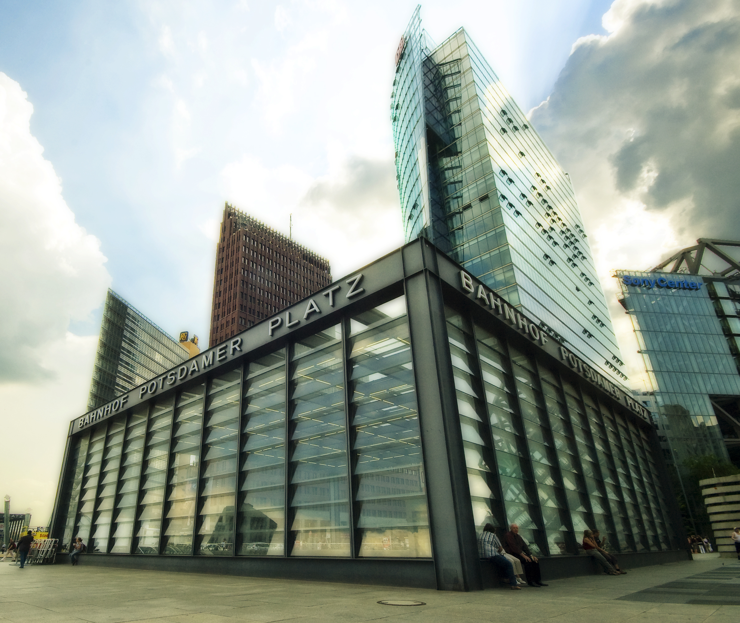 Der Potsdamer Platz ist ein Verkehrsknoten im Berliner Ortsteil Tiergarten im Bezirk Mitte zwischen der alten Innenstadt im Osten und dem neuen Berliner Westen. Er schließt sich westlich an den Leipziger Platz an und liegt an der Stelle des ehemaligen Potsdamer Stadttors vor der Akzisemauer. Bis zum Zweiten Weltkrieg war der noch als Platz zu erlebende Ort ein beliebter Treffpunkt der politischen, sozialen und künstlerischen Szene Berlins. Das nach 1990 auf dem alten Stadtgrundriss größtenteils neu bebaute Terrain zählt zu den markantesten Orten der Stadt und wird von zahlreichen Touristen besucht.